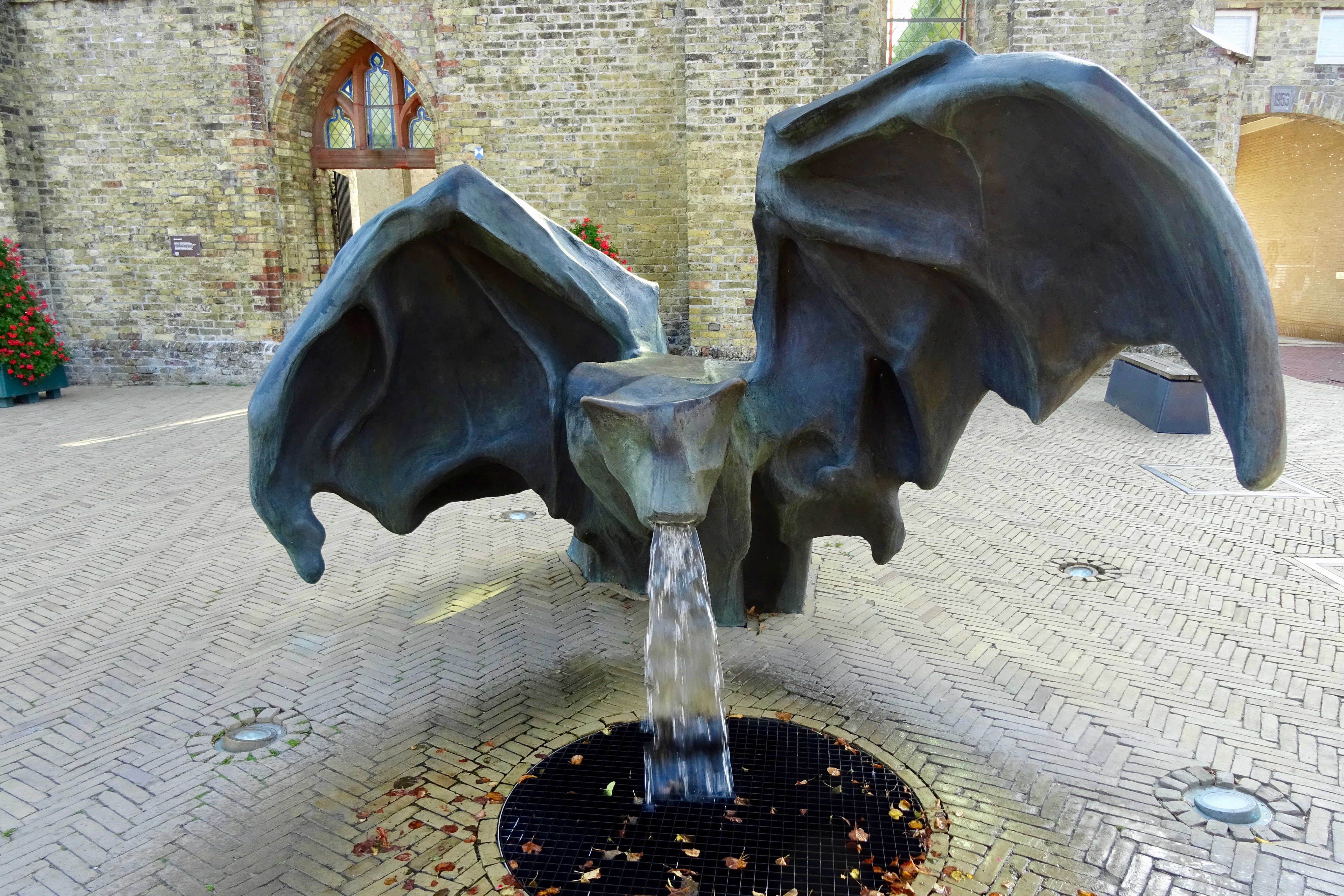 Fontein "De Vleermuis" door Johan Creten in Bolsward